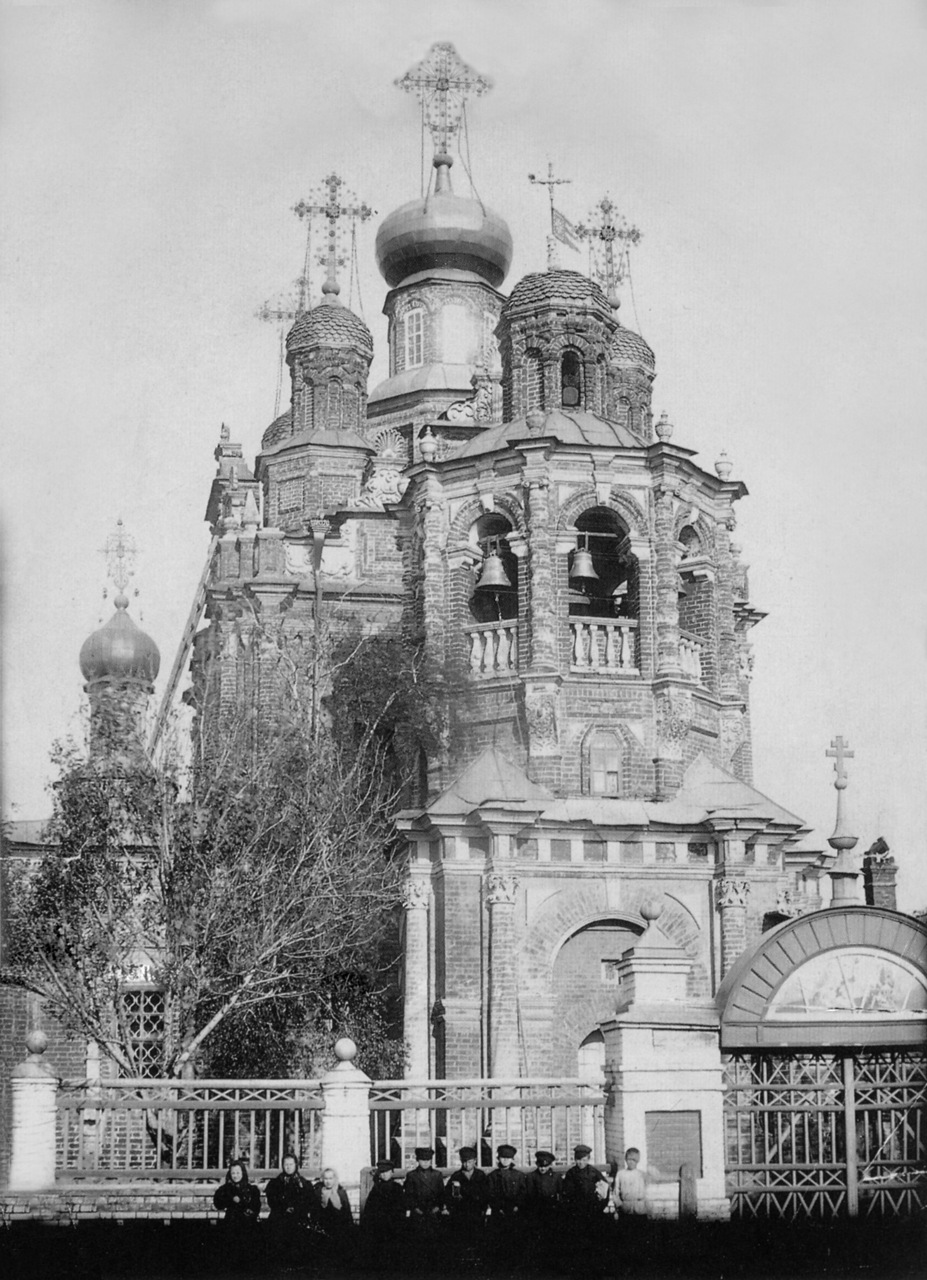 Фотографии Нижнего Новгорода конца 19 - начала 20 века